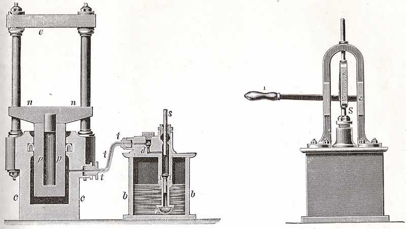 Bramah press